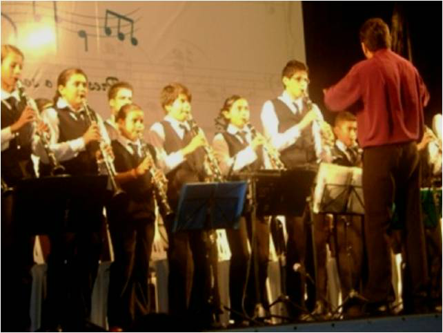 Festival de Música da Ibiapaba